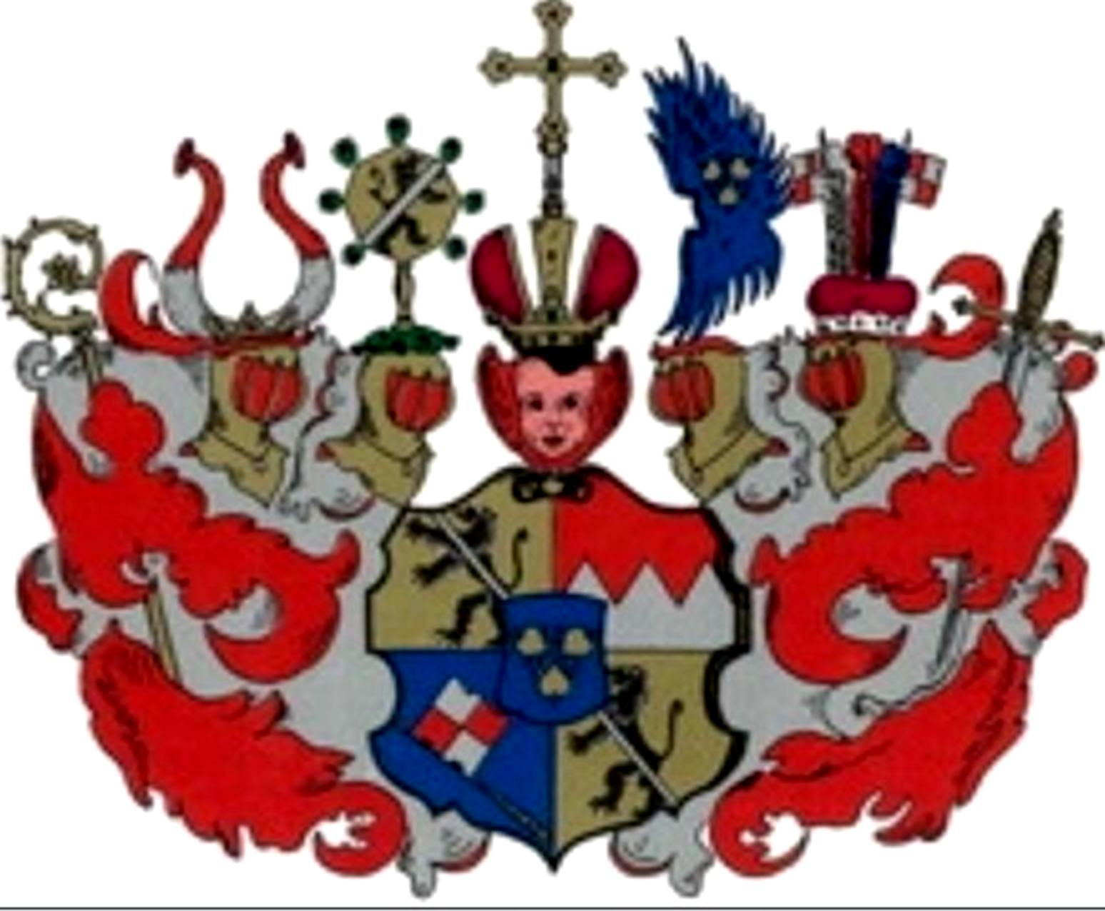 Wappen Peter Philipp von Dernbach (1619-1683) Fürstbischof von Bamberg 1672-1683, Fürstbischof von Würzburg 1675-1683